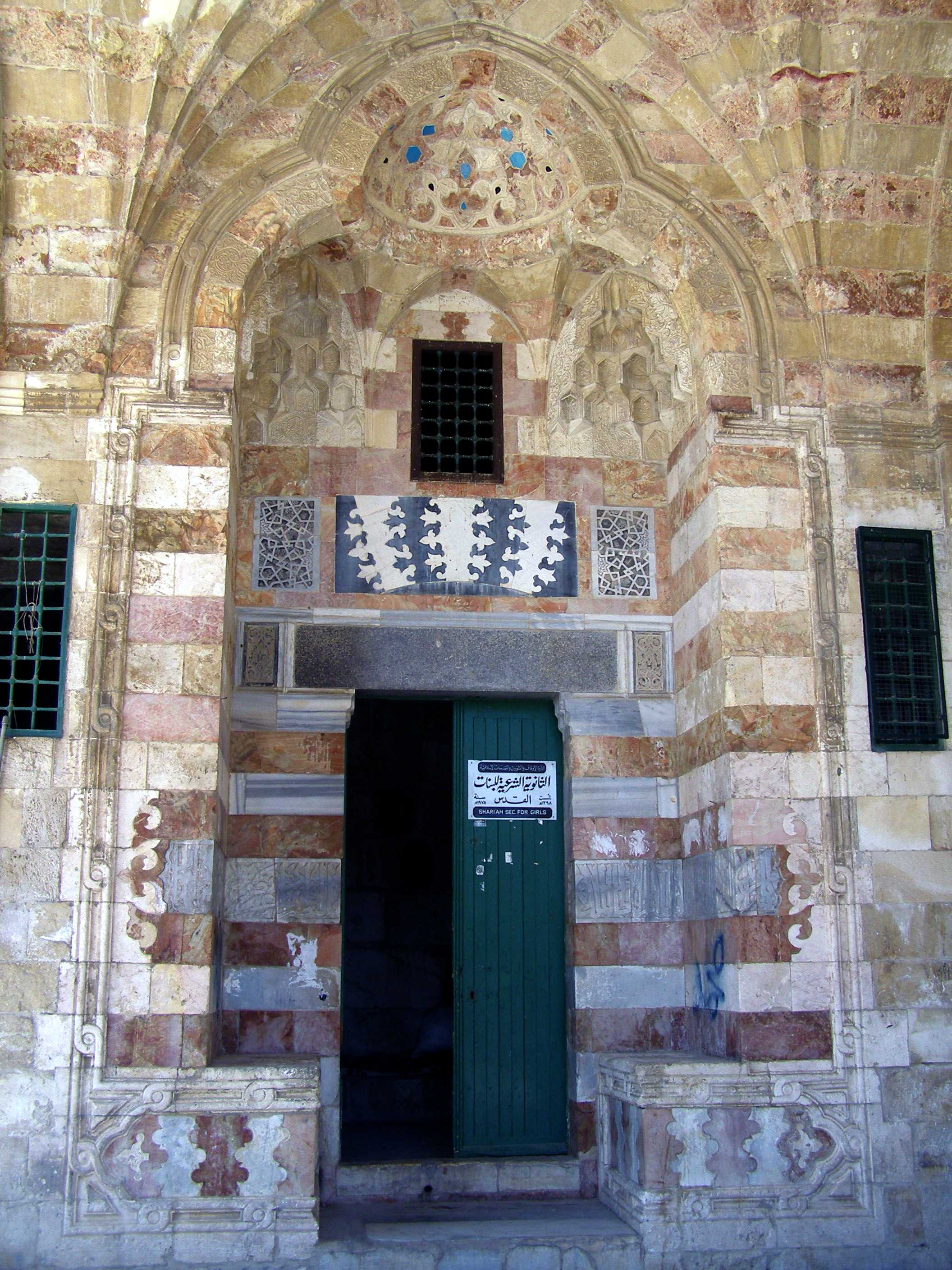 Temple Mount, Jerusalem Madrassat Al Ashraffiyya